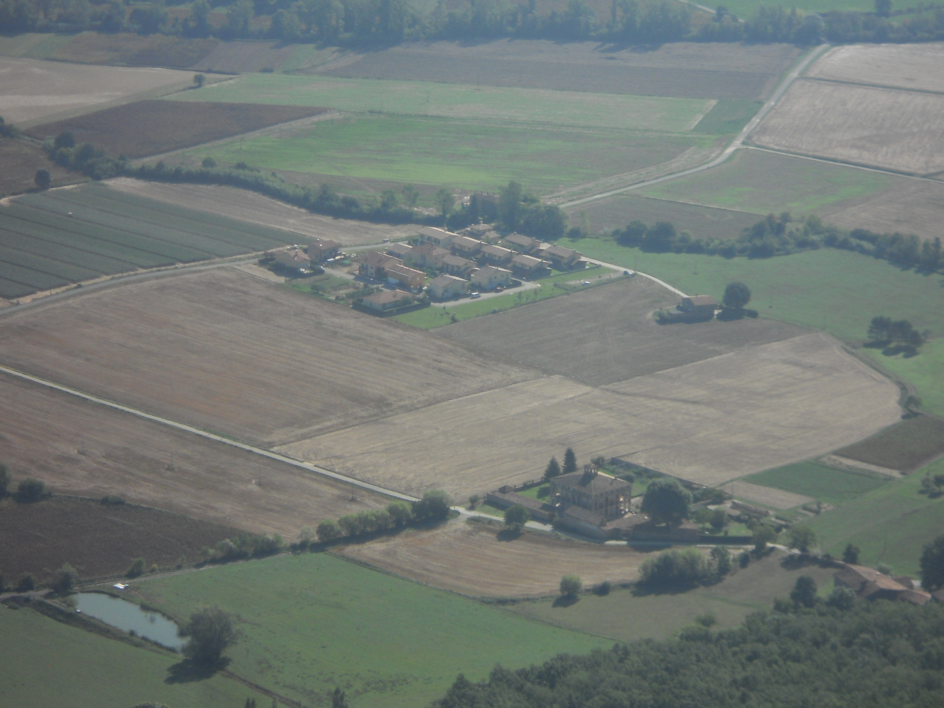 La Clapera nova i el veïnat de Can Sala, dels Hostalets d'en Bas, vists des de Castelló d'en Bas.